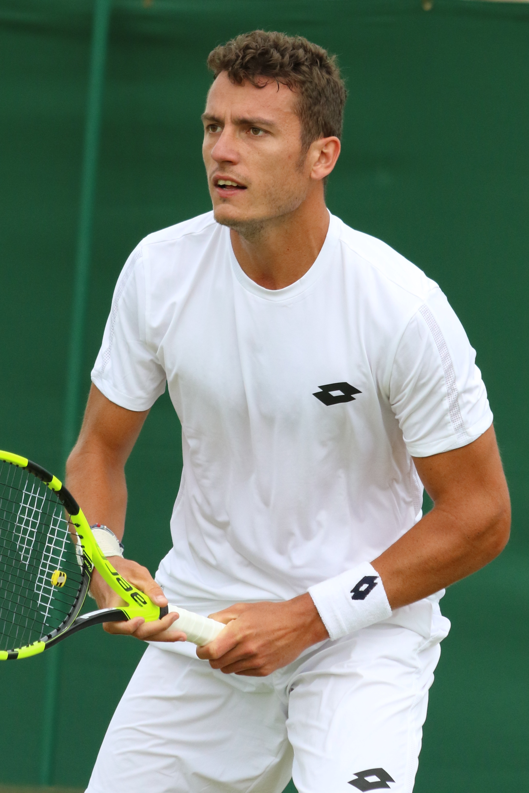 Giannessi WMQ16 (17)